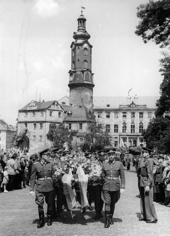 Zentralbild Wittig 27.6.57 Ehrenvolles Begräbnis für Louis Fürnberg in Weimar. Mit einer Trauerfeier der Regierung der DDR im Weißen Saal des Weimarer Schlosses begannen am 27.6.1957 die Trauerfeierlichkeiten anläßlich des ehrenvollen Begräbnisses für den in der Nacht vom 23. zum 24.Juni unerwartet verstorbenen Weimarer Lyriker und Schriftsteller Louis Fürnberg, Nationalpreisträger und Mitglied der Deutschen Akademie der Künste zu Berlin. Ein fast unübersehbarer Trauerzug gab dann dem verstorbenen Dichter das letzte Geleit zum historischen Friedhof in Weimar. UBz.: An der Spitze des Trauerzuges tragen Offiziere der Nationalen Volksarmee den Kranz des Präsidenten der Deutschen Demokratischen Republik. Im Hintergrund das Weimarer Schloss